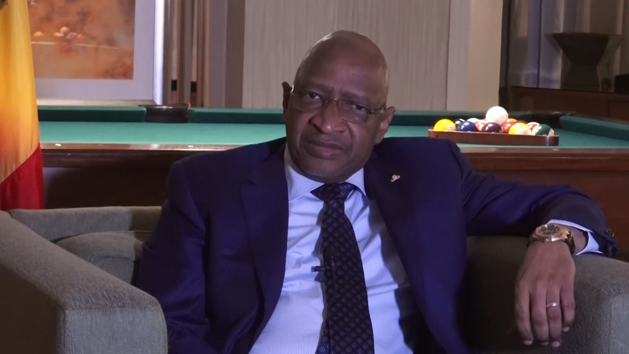 Le Premier ministre Soumeylou Boubèye Maïga du Mali était en déplacement aux Etats-Unis pour appeler à un renforcement américain au Mali. Au cours de son voyage, il a accordé une interview à VOA Afrique. Le Premier ministre s'est dit choqué par le massacre d'Ogossagou.